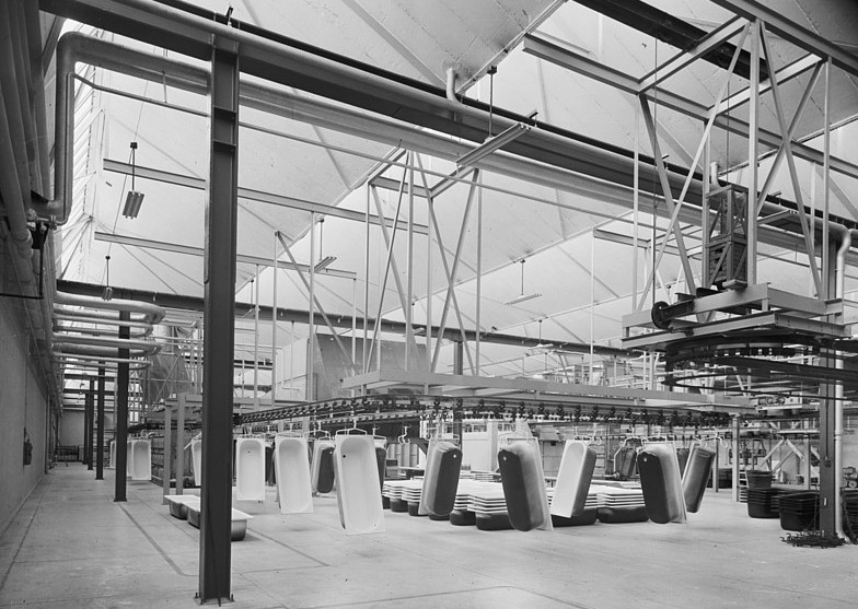 Gustavsbergs porslinsfabrik, badkarstillverkning